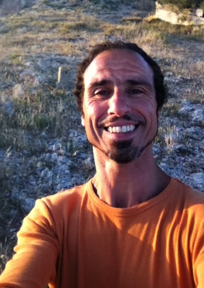 Pietro Pizzuti comédien auteur metteur en scène traducteur